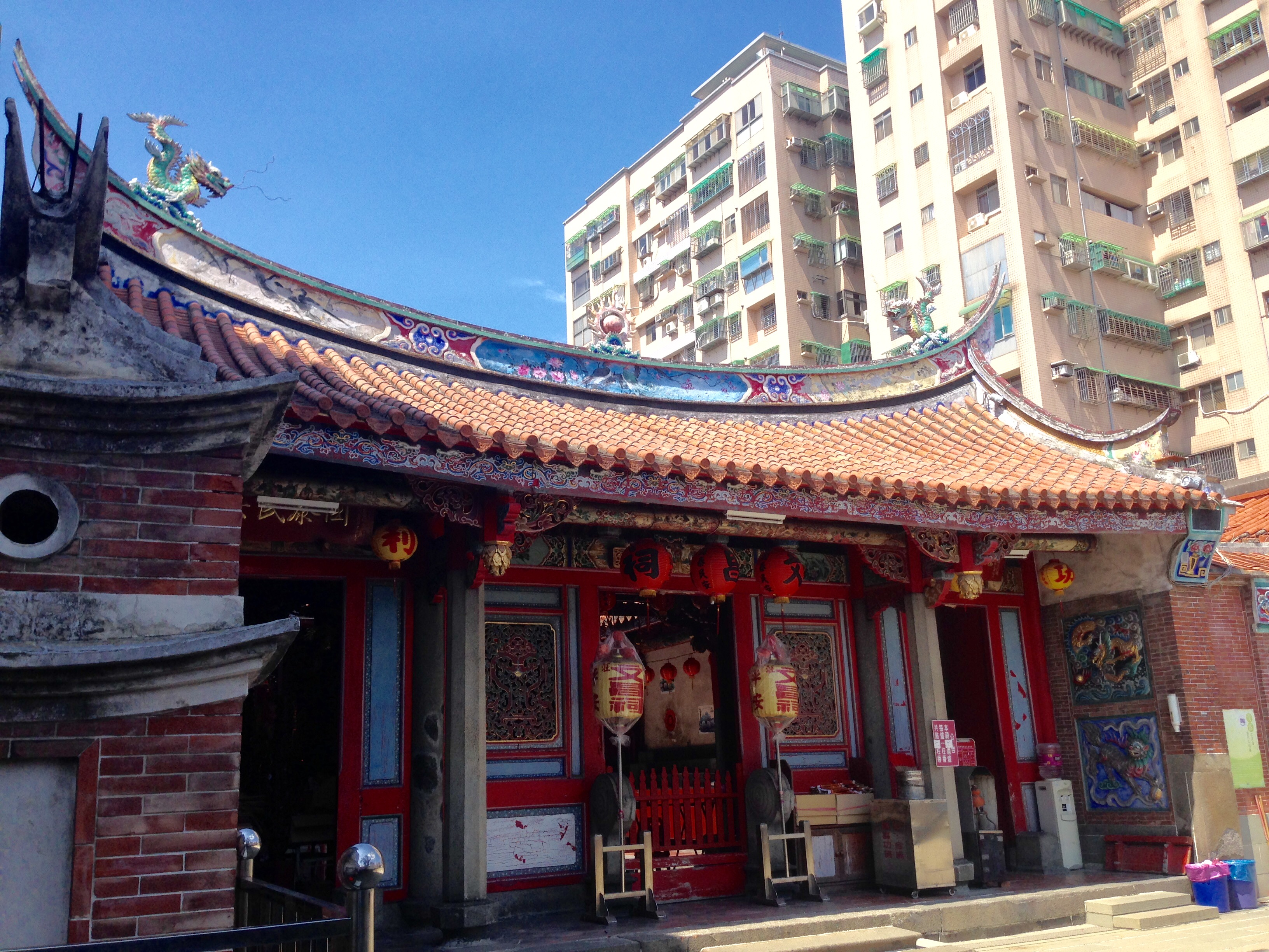 中文（台灣）: 新莊文昌祠一景